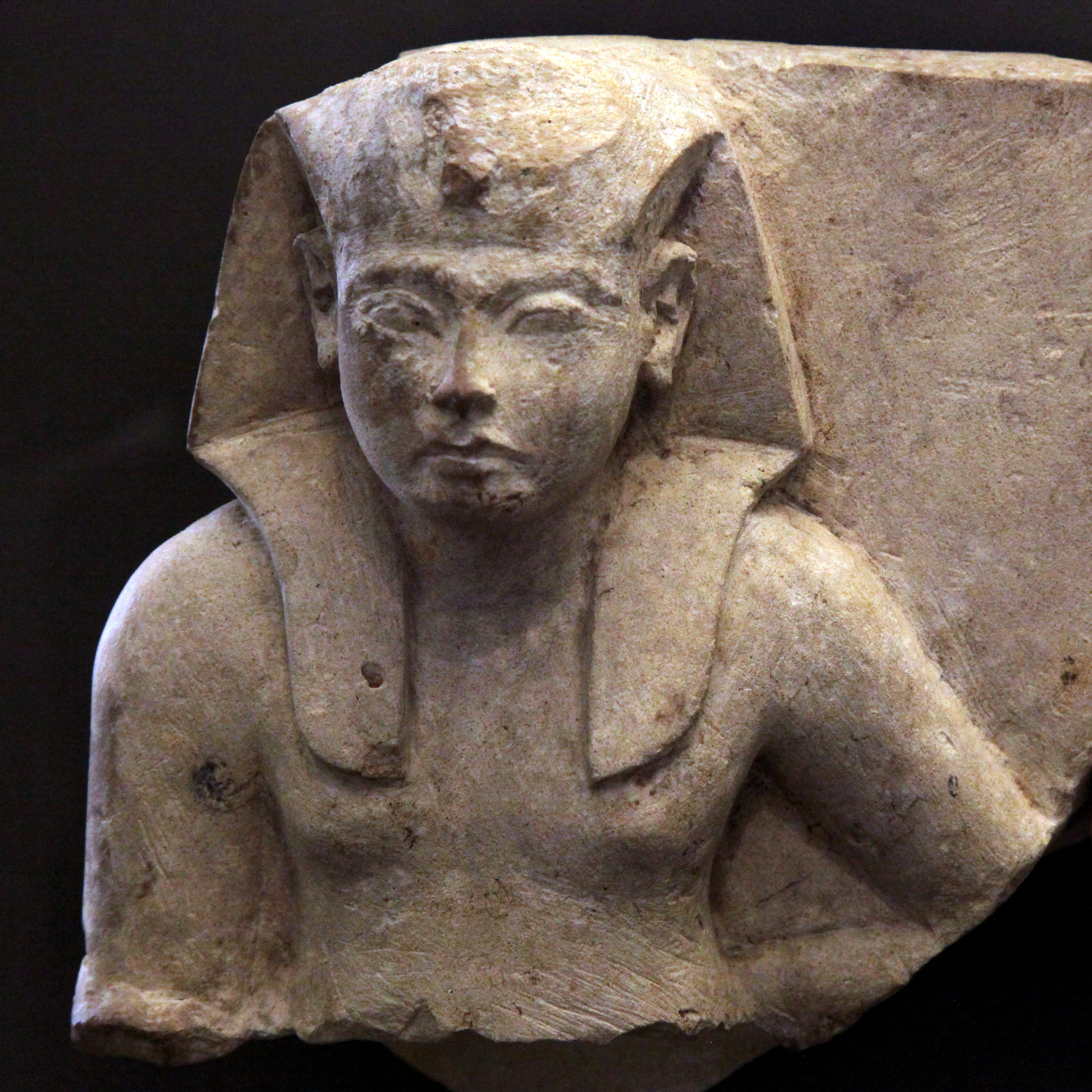 detail on King Ay